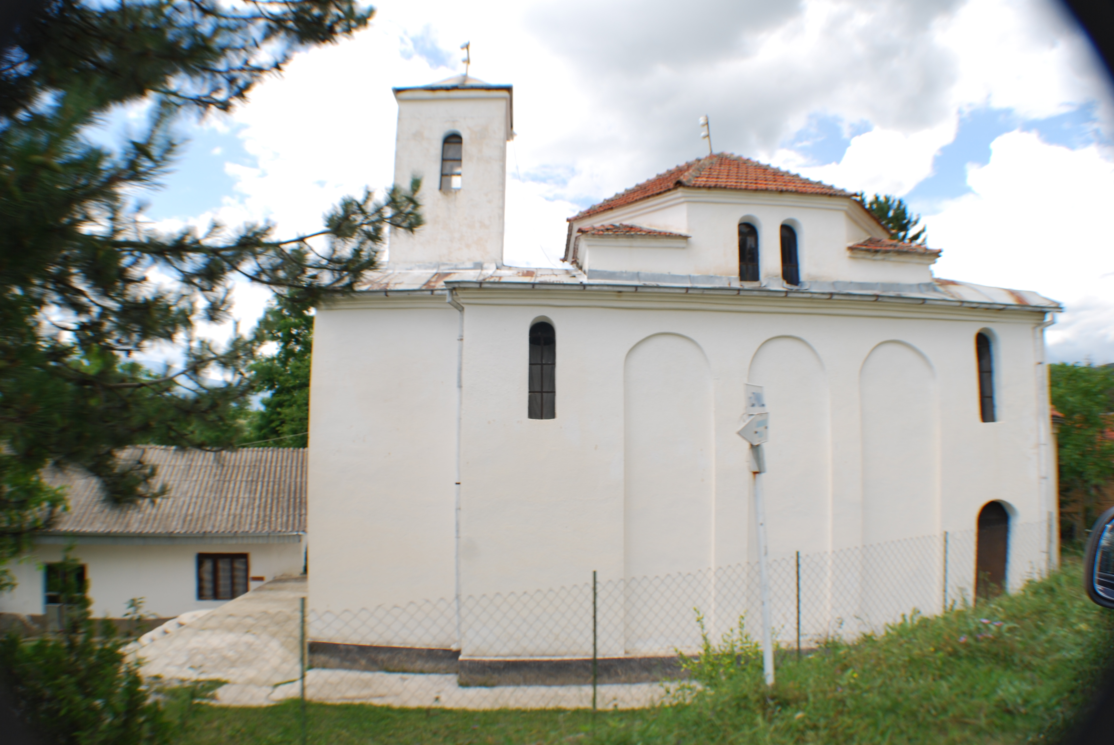 Црквата Св. Ѓорѓи во село Блаце, Тетово